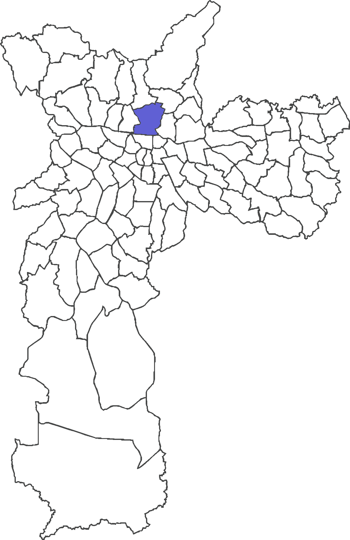 Localização do distrito de Santana no município de São Paulo.